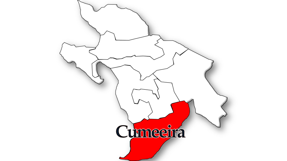 População